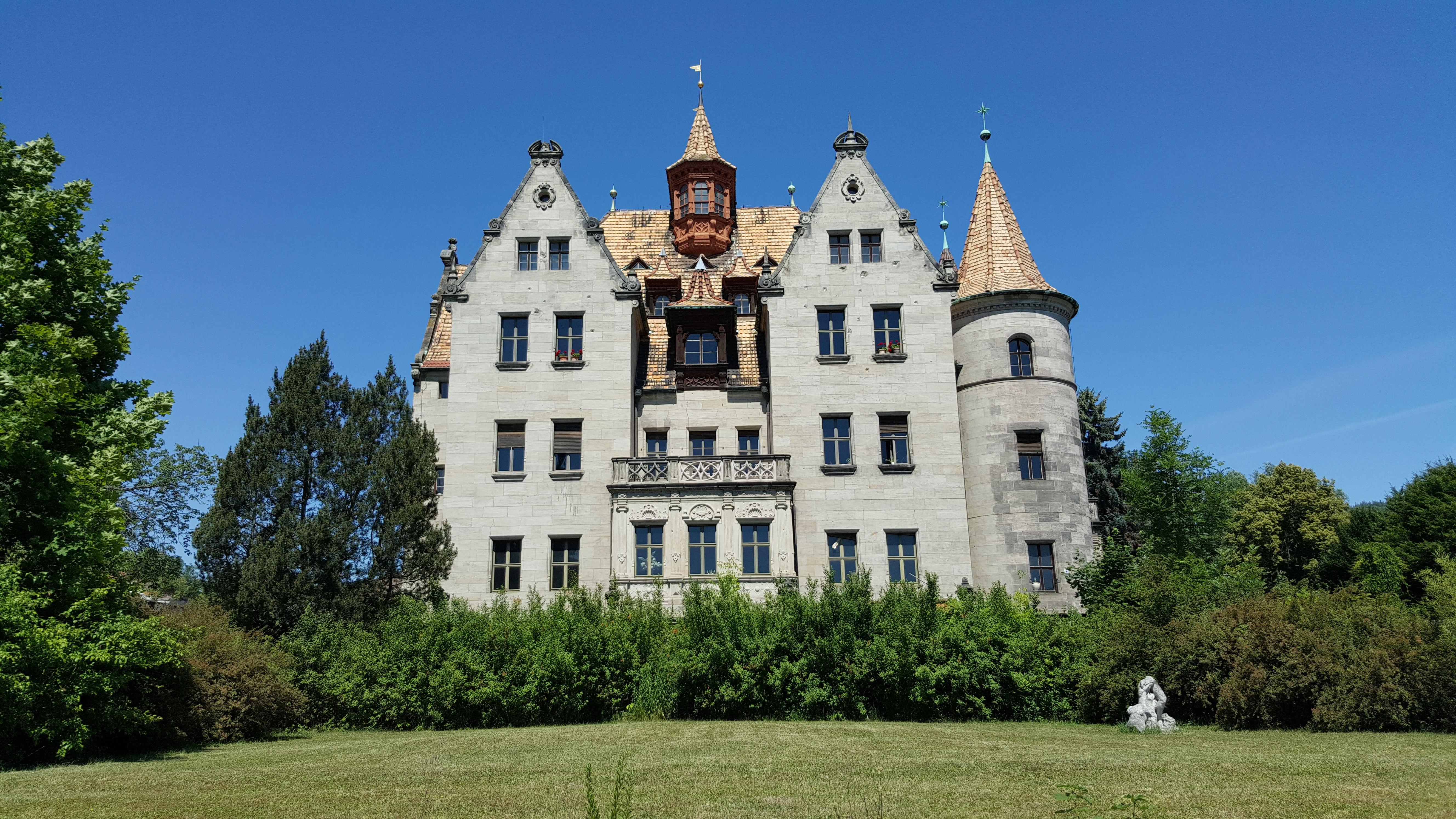 Aufnahme der Richterschen Villa aus Mitte 2015. Das Gebäude wird als Büro der in Rudolstadt ansässigen Firma Zeilenwert genutzt.